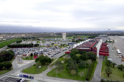 Visuale panoramica dell'aeroporto di Lamezia Terme